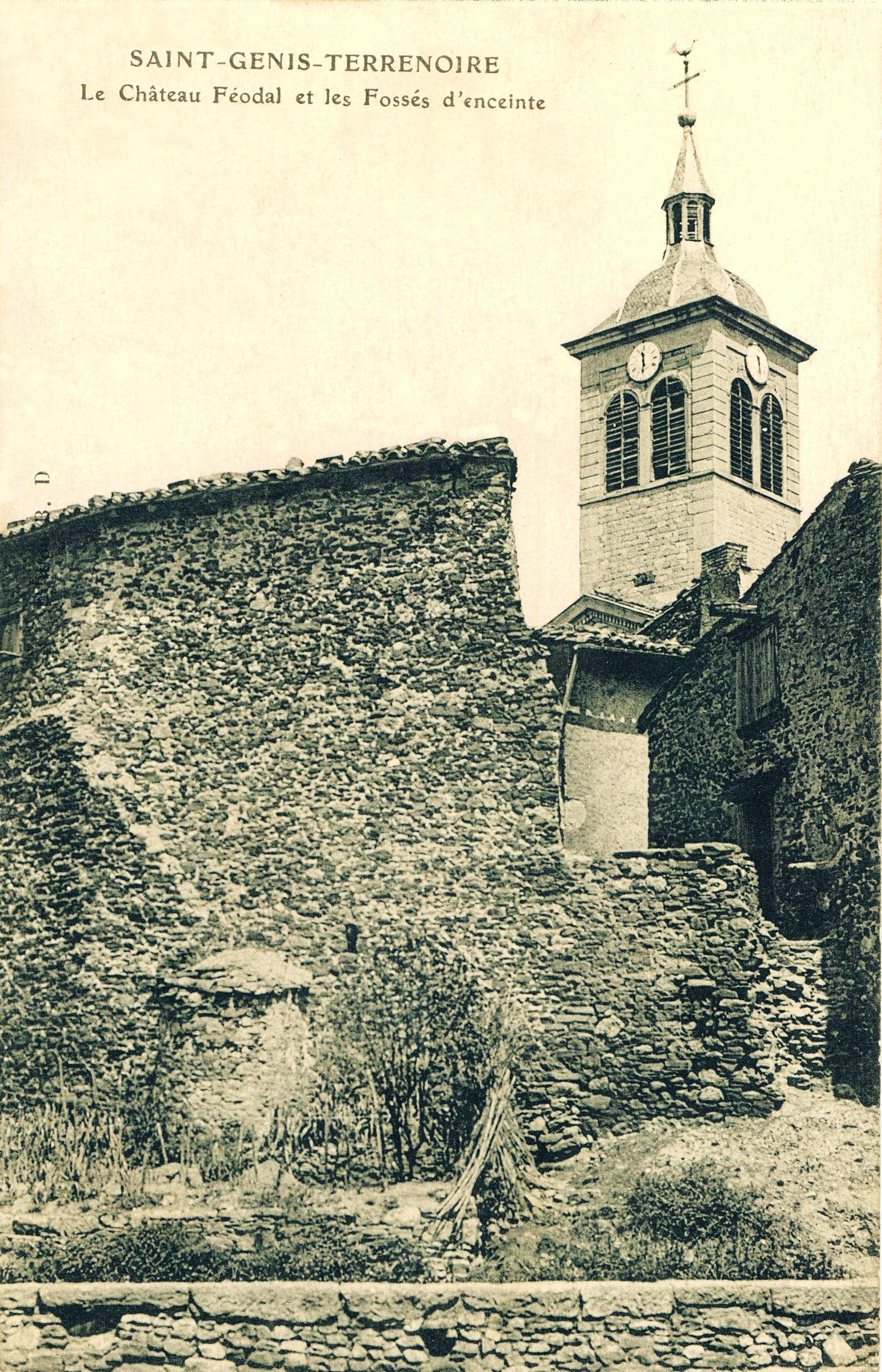 Saint-Genis-Terrenoire ( Loire : département / France ) Carte postale vers 1910 : le château féodal et les fossés